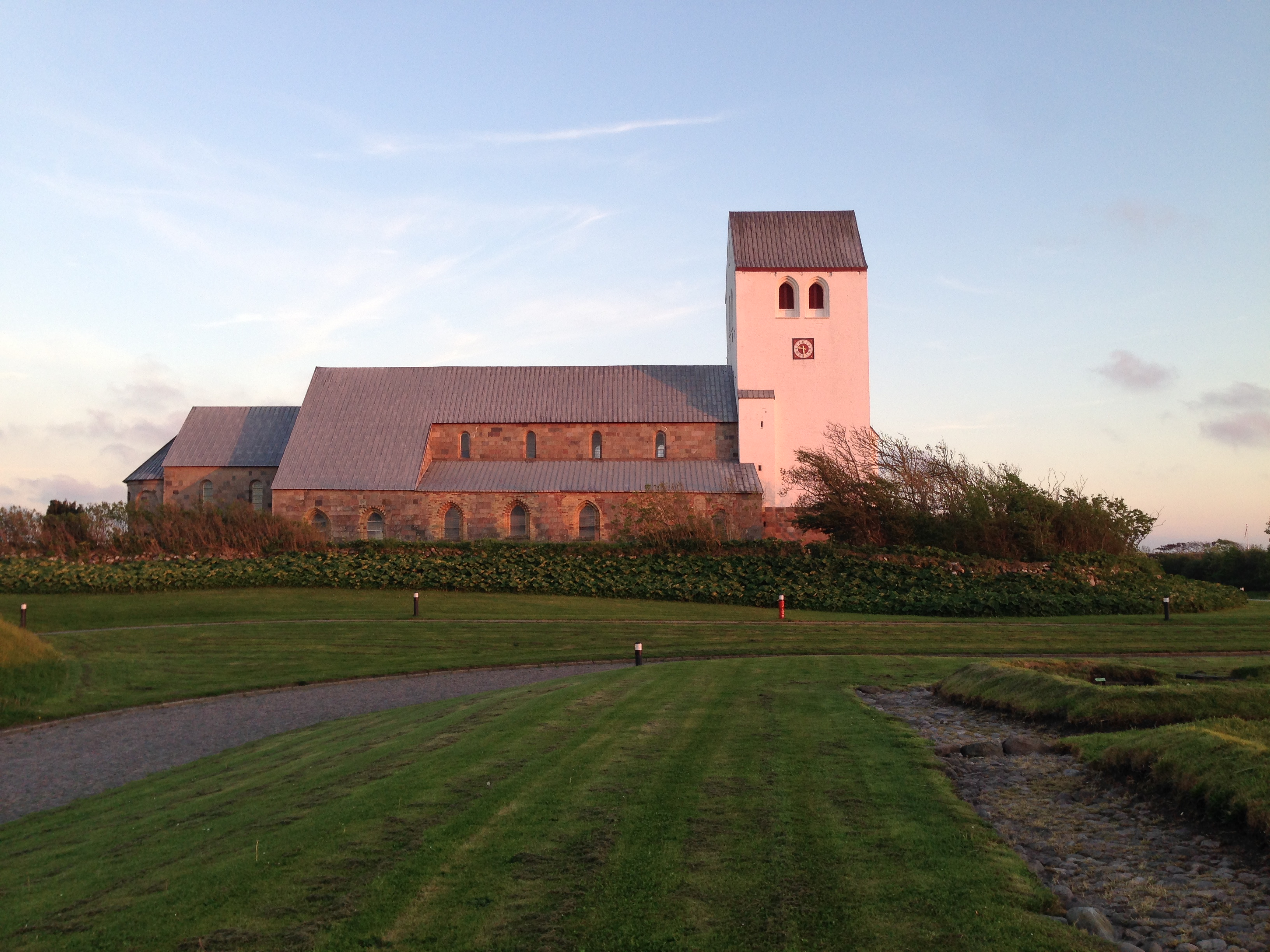 Vestervig Kirke i 2017